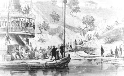 Bateau à vapeur sur l'Alabama